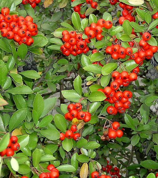 Pyracantha coccinea